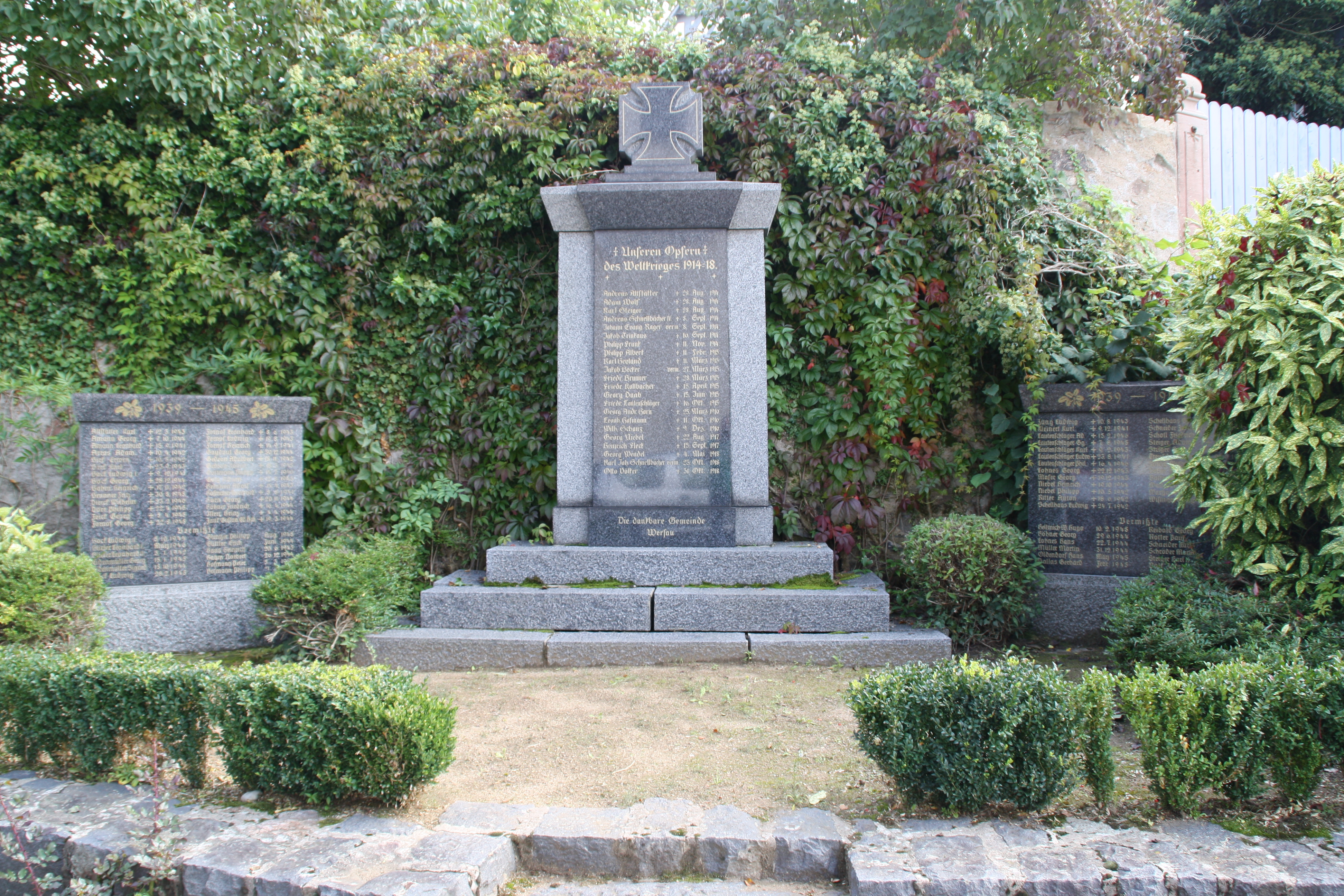 Gefallenen-Denkmal Wersau, Brensbach, Odenwaldkreis, Hessen – Am Denkmal am Fuße des Pfarrberges, wird der 22 Opfer des 1. und der 53 Opfer und 24 Vermisste des 2. Welkrieges gedacht, die aus Wersau stammten.